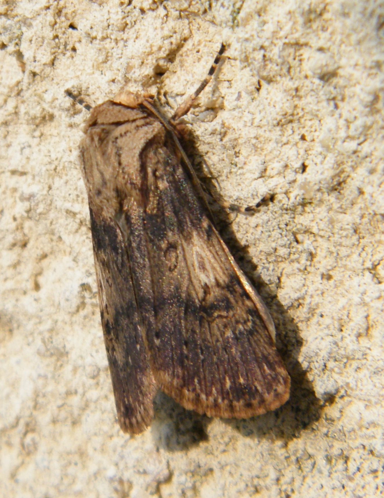 Noctuelle Agrotis puta, agrotide des renouées, Forest-Montiers, Somme, Fr.